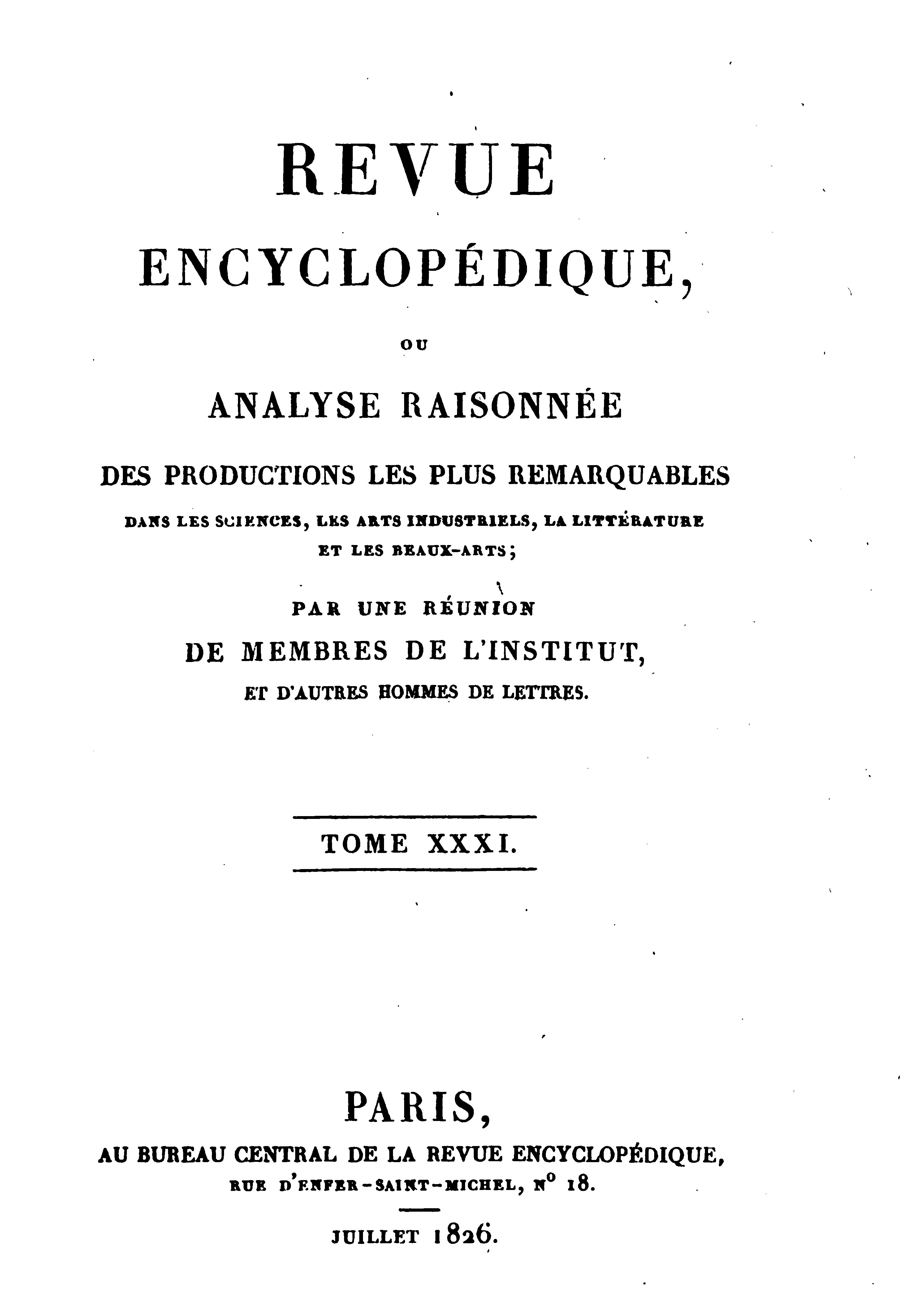 Page couverture de la Revue encyclopédique de juillet 1826. Extrait du fichier pdf au Google Books, améliorations avec GIMP.